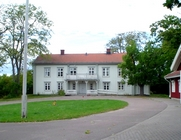 Skåre Herrgård